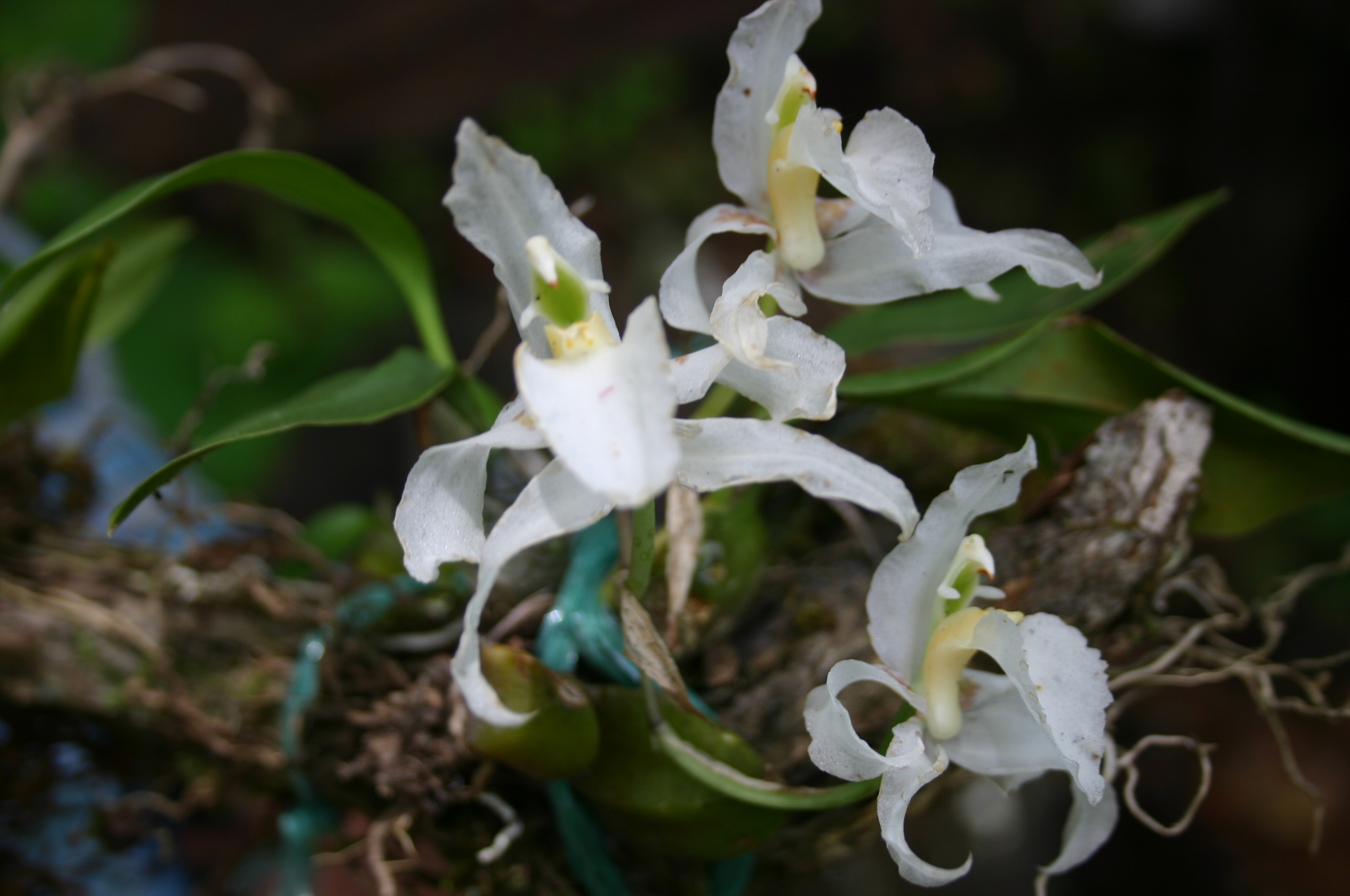 orquidea